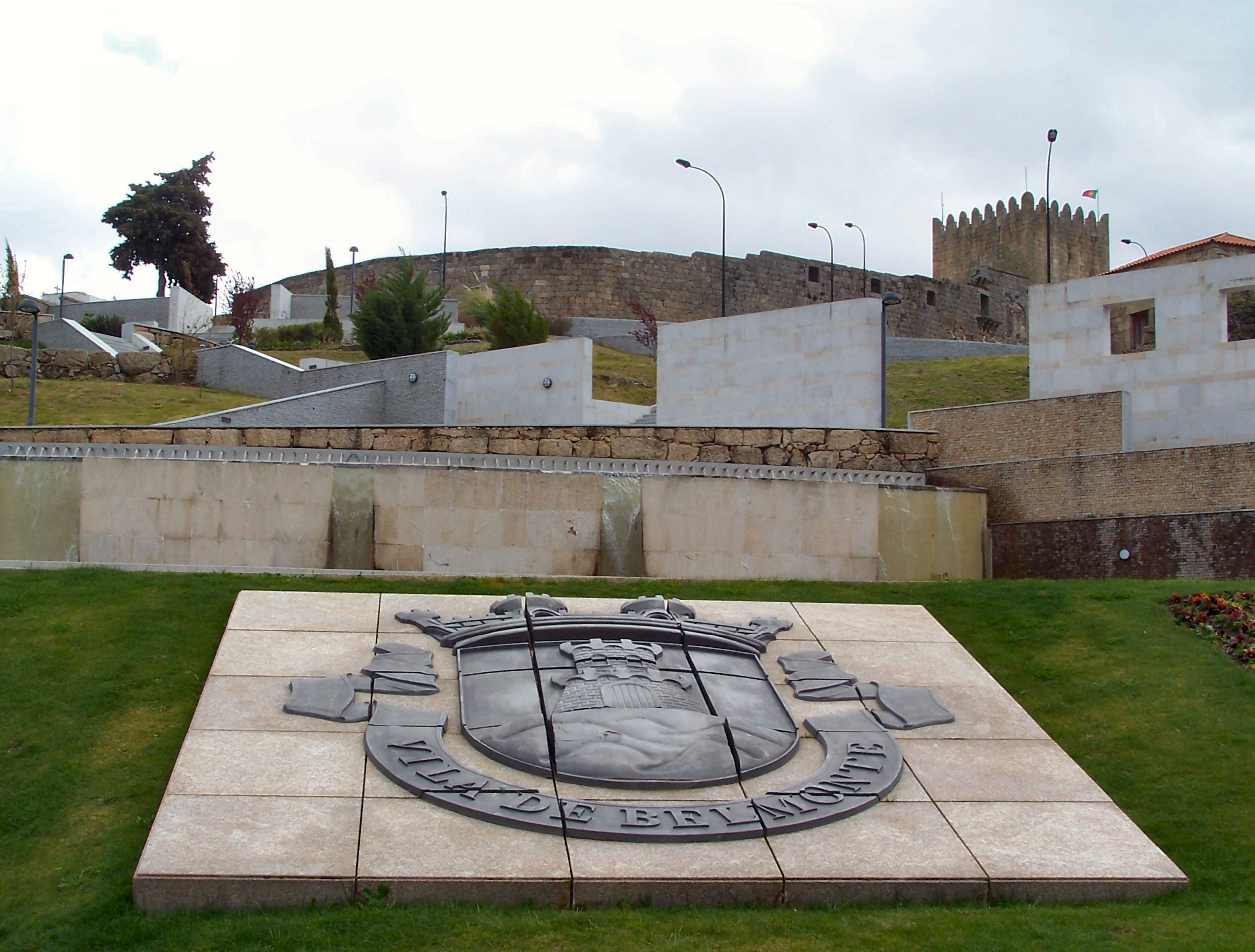 Vila de Belmonte com brasão em Belmonte